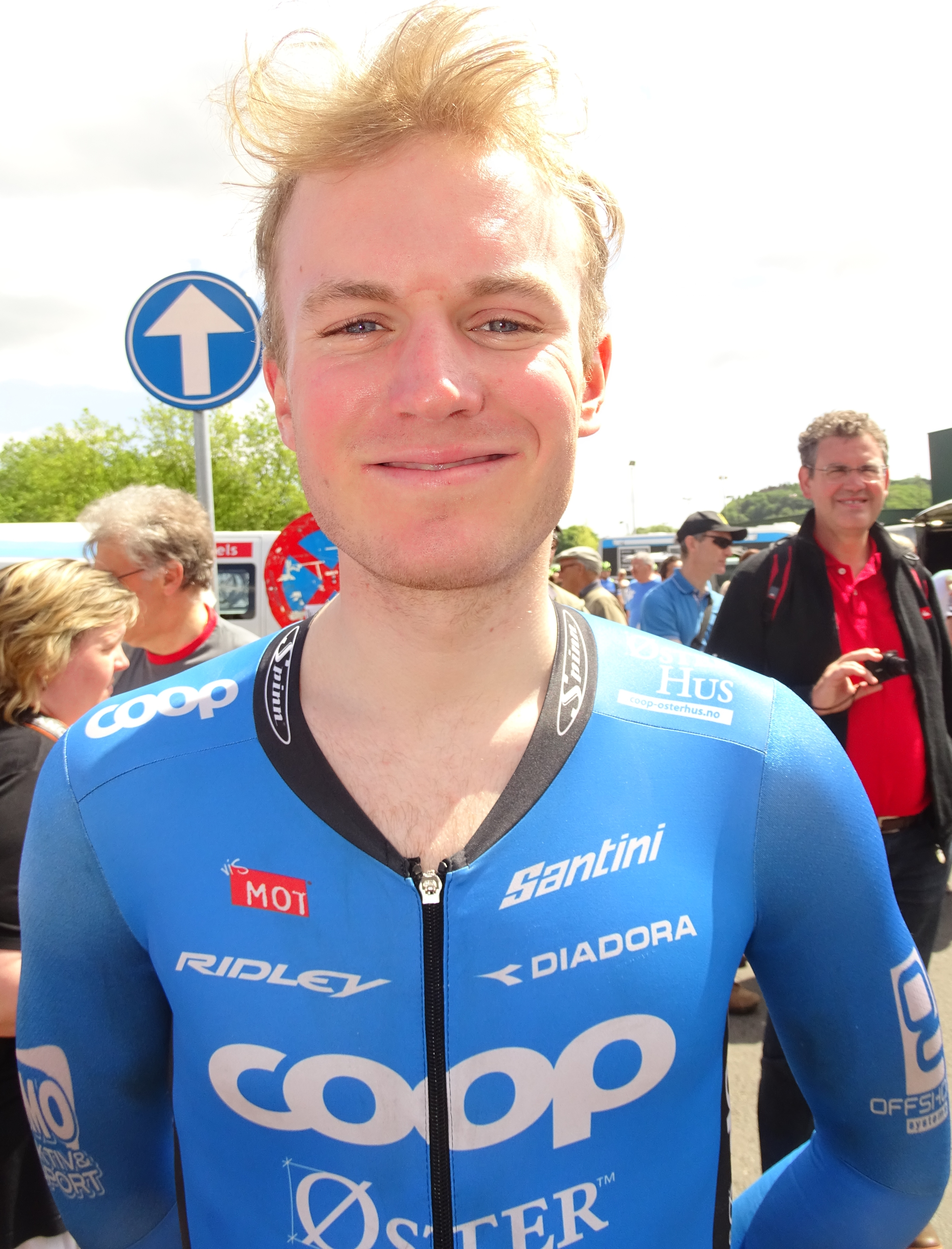 Reportage réalisé le dimanche 7 juin à l'occasion du départ du Mémorial Philippe Van Coningsloo 2015 à Wavre, Belgique.